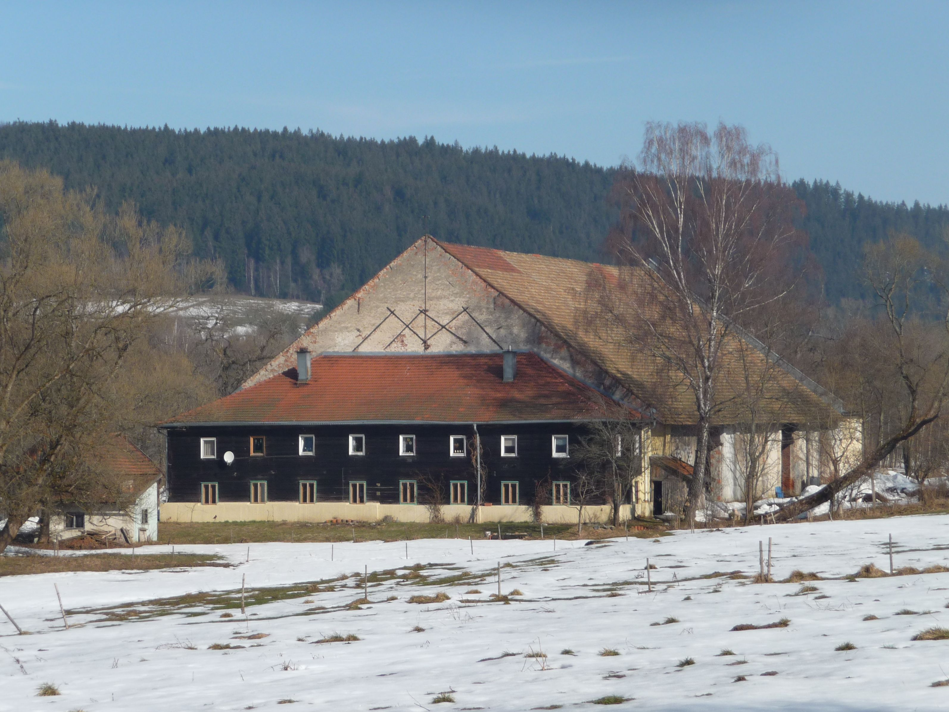 Die alte Glashütte in Theresienthal